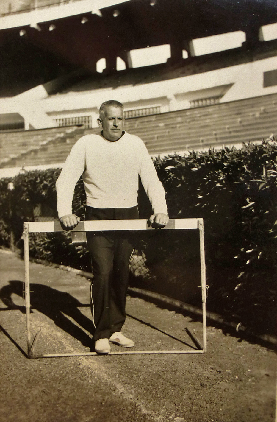 Caamaño también fué entrenador de atletismo de River